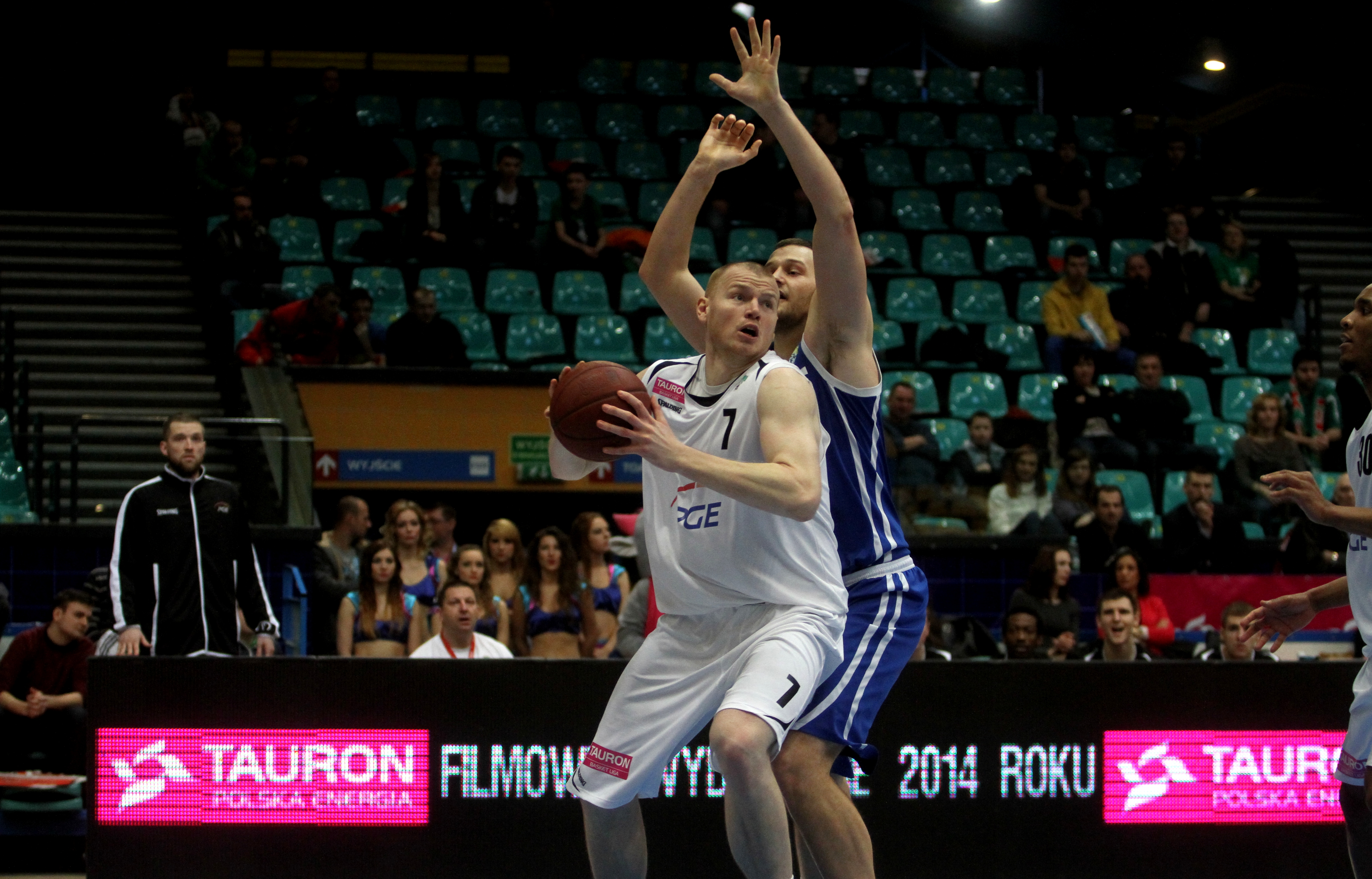 Damian Kulig, PGE Turów Zgorzelec